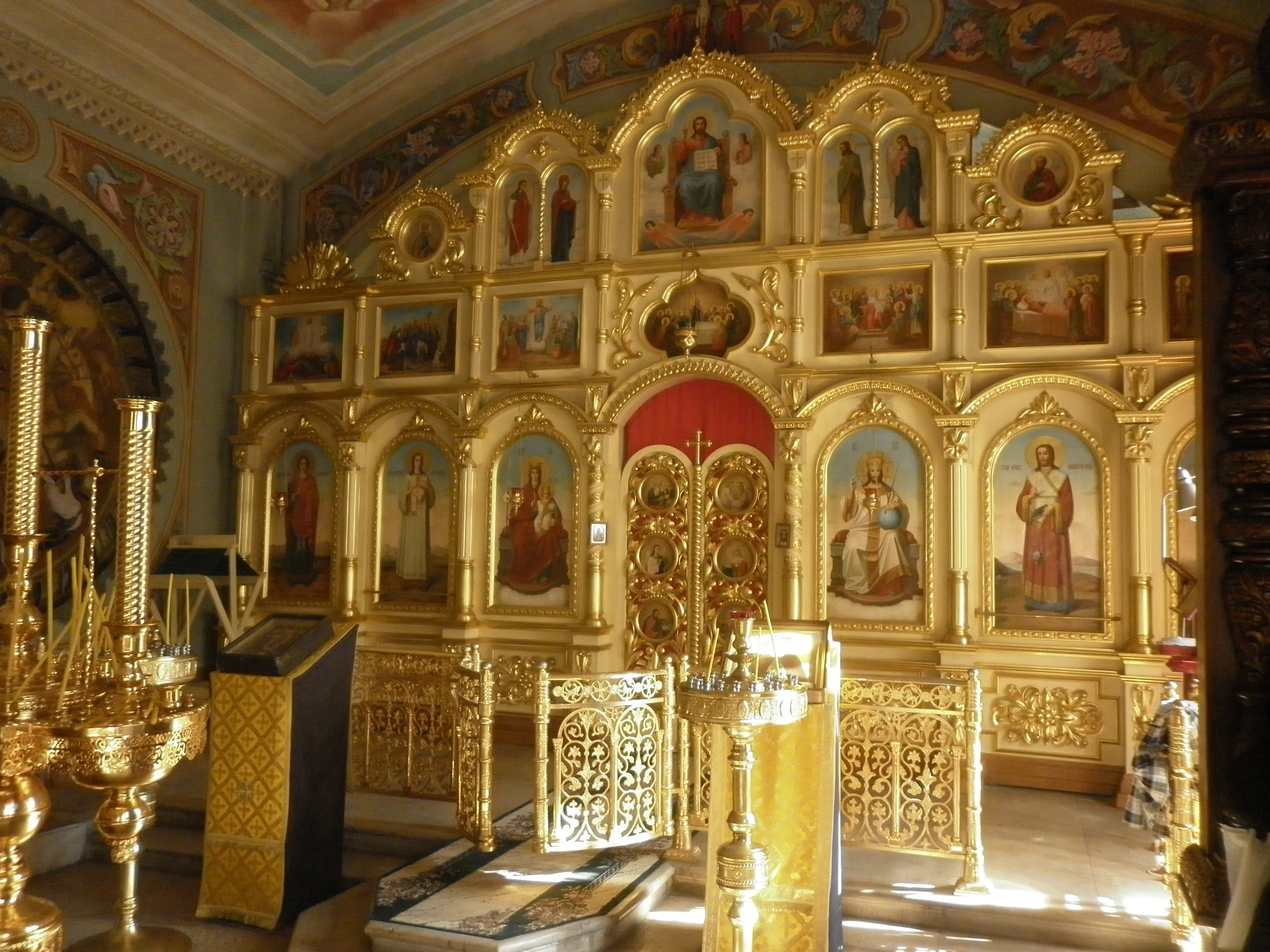 Собор Успенский (Москва и Московская область, Дмитров, Историческая площадь, 11)